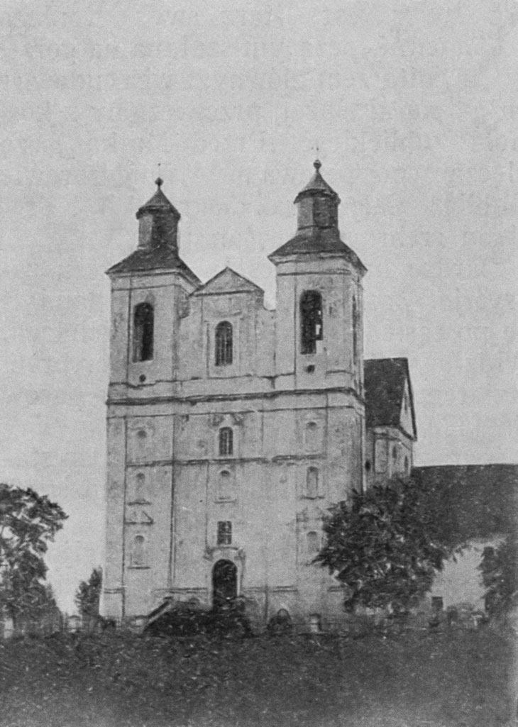 Беларуская (тарашкевіца): Селішча (Sielišča). Касьцёл Сьвятой Вэранікі і кляштар бэрнардынаў (Селішча)